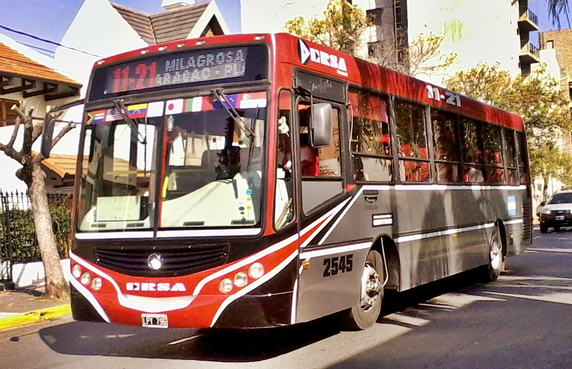 Interno 2545 de la empresa ERSA Urbano en la línea 11-21 de la ciudad de Paraná, Entre Ríos Argentina. Carrocería Metalpar Tronador II, motor Mercedes-Benz OH1518. ColectivosEntreRios.